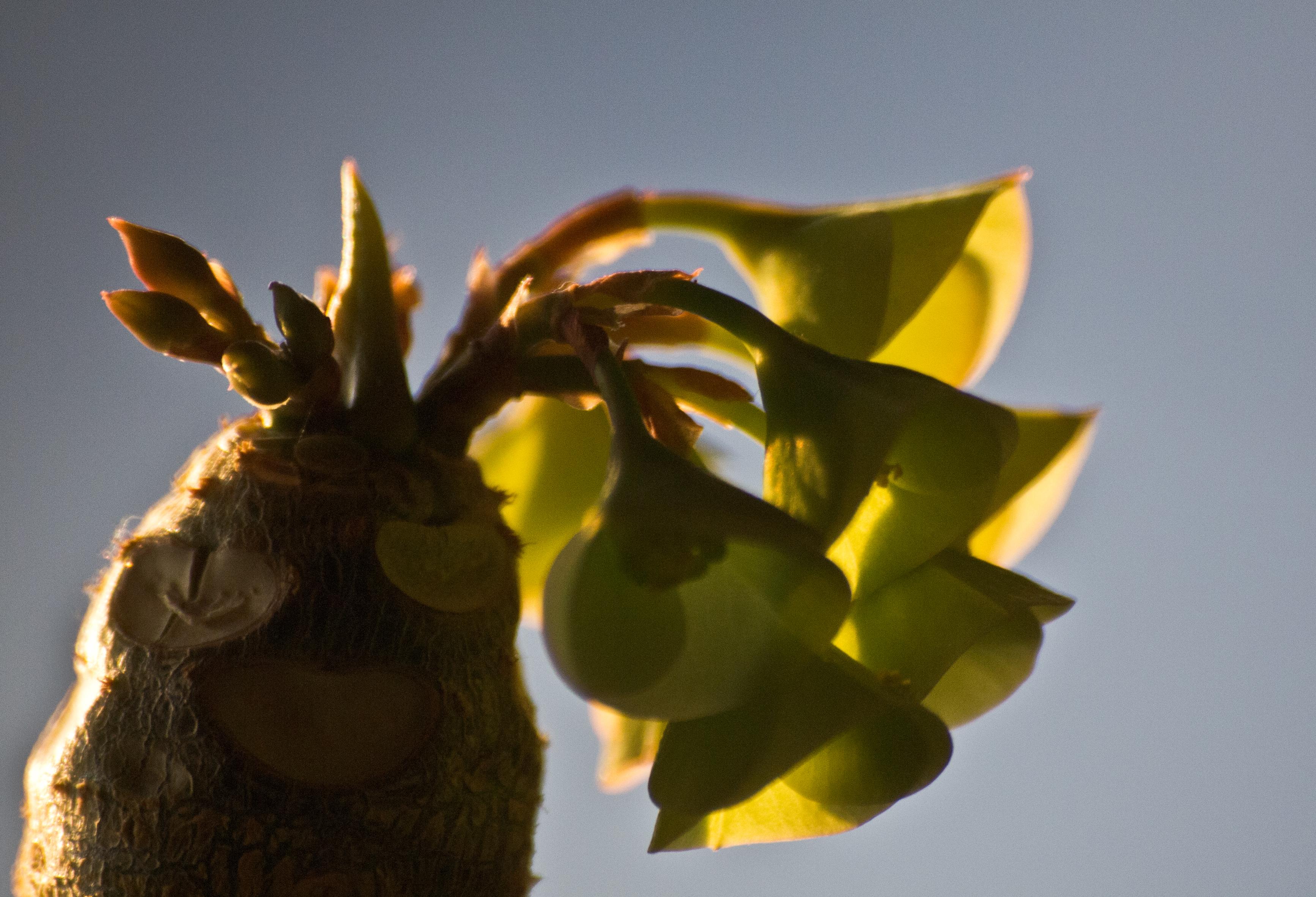 Euphorbia millotii Details